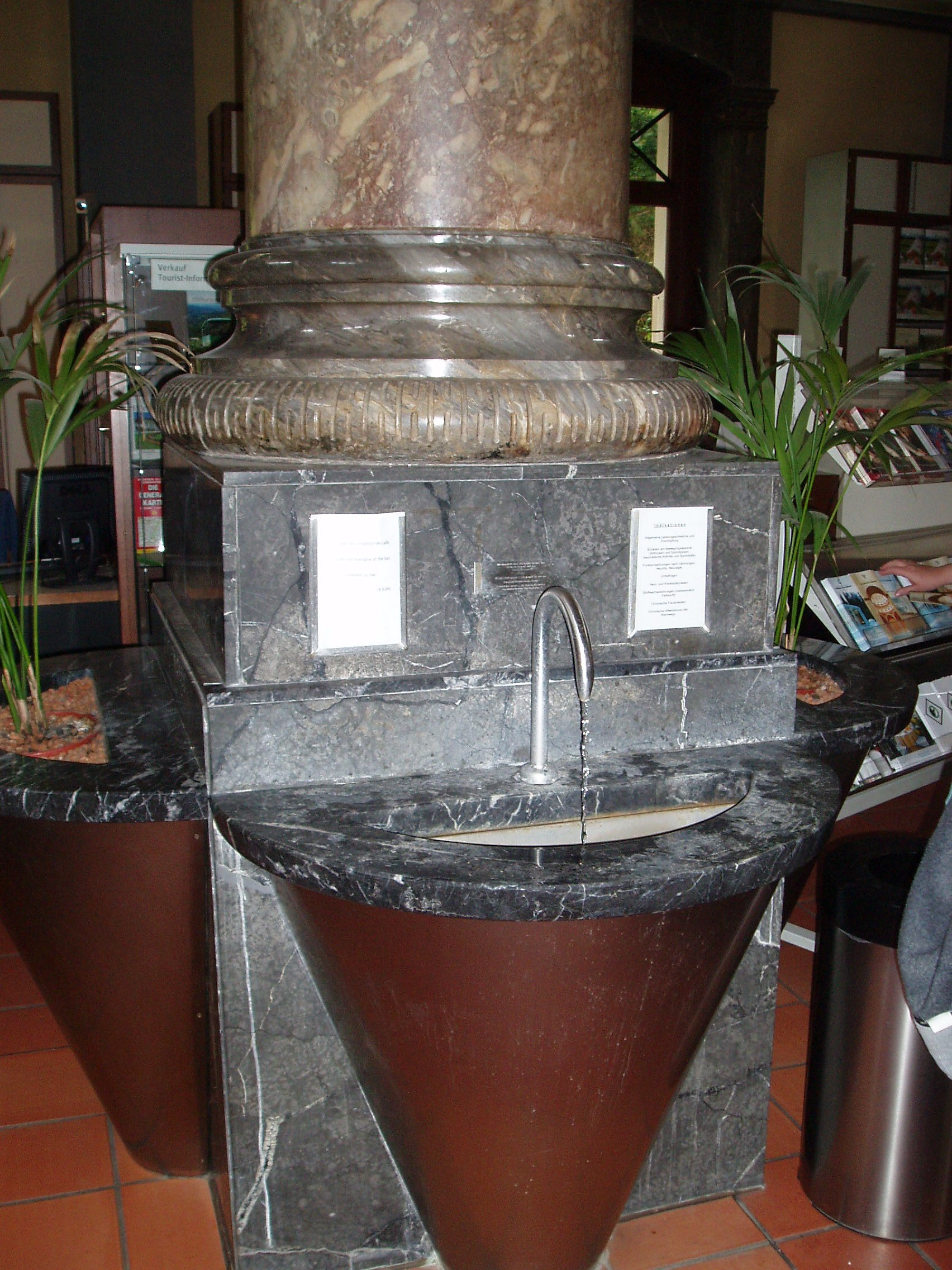 Wasserhahn mit Becken in der Trinkhalle Baden-Baden